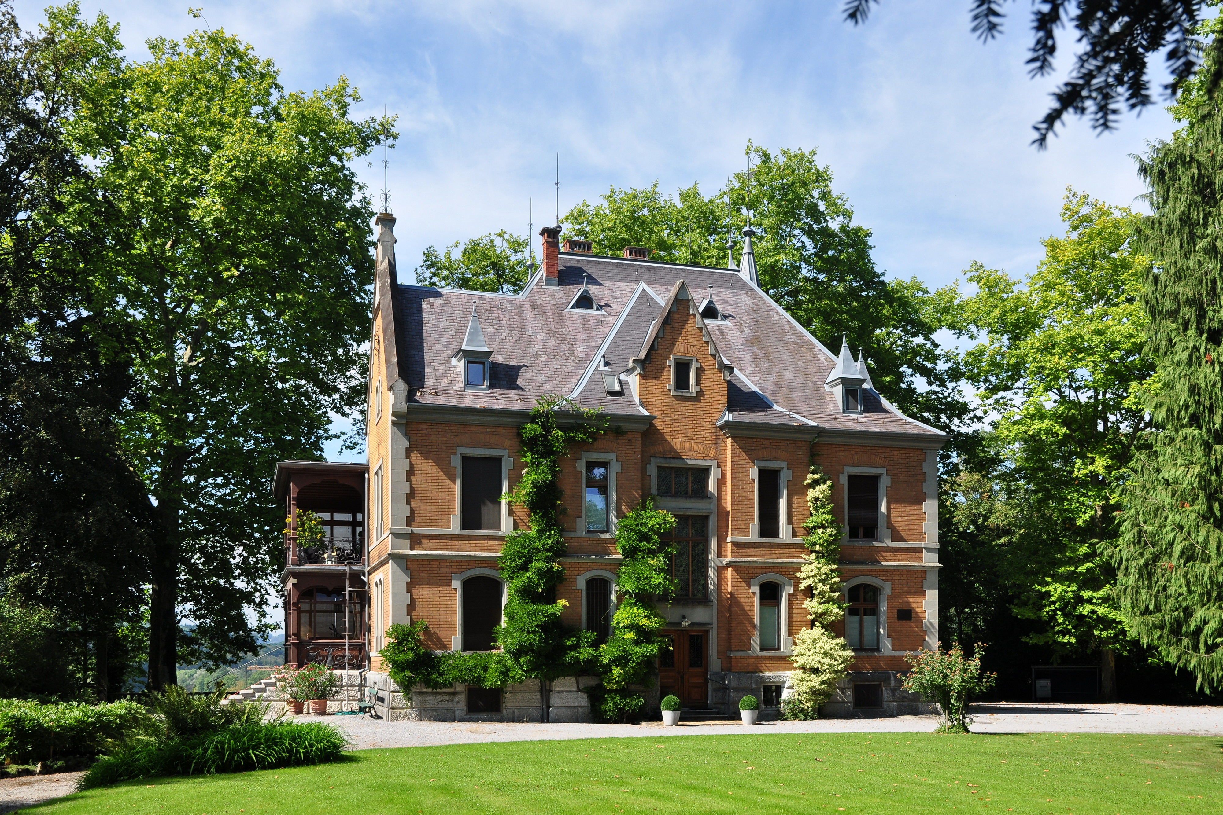 Villa Schlosshalde, Dorfstrasse 14 in Pfungen (Switzerland)